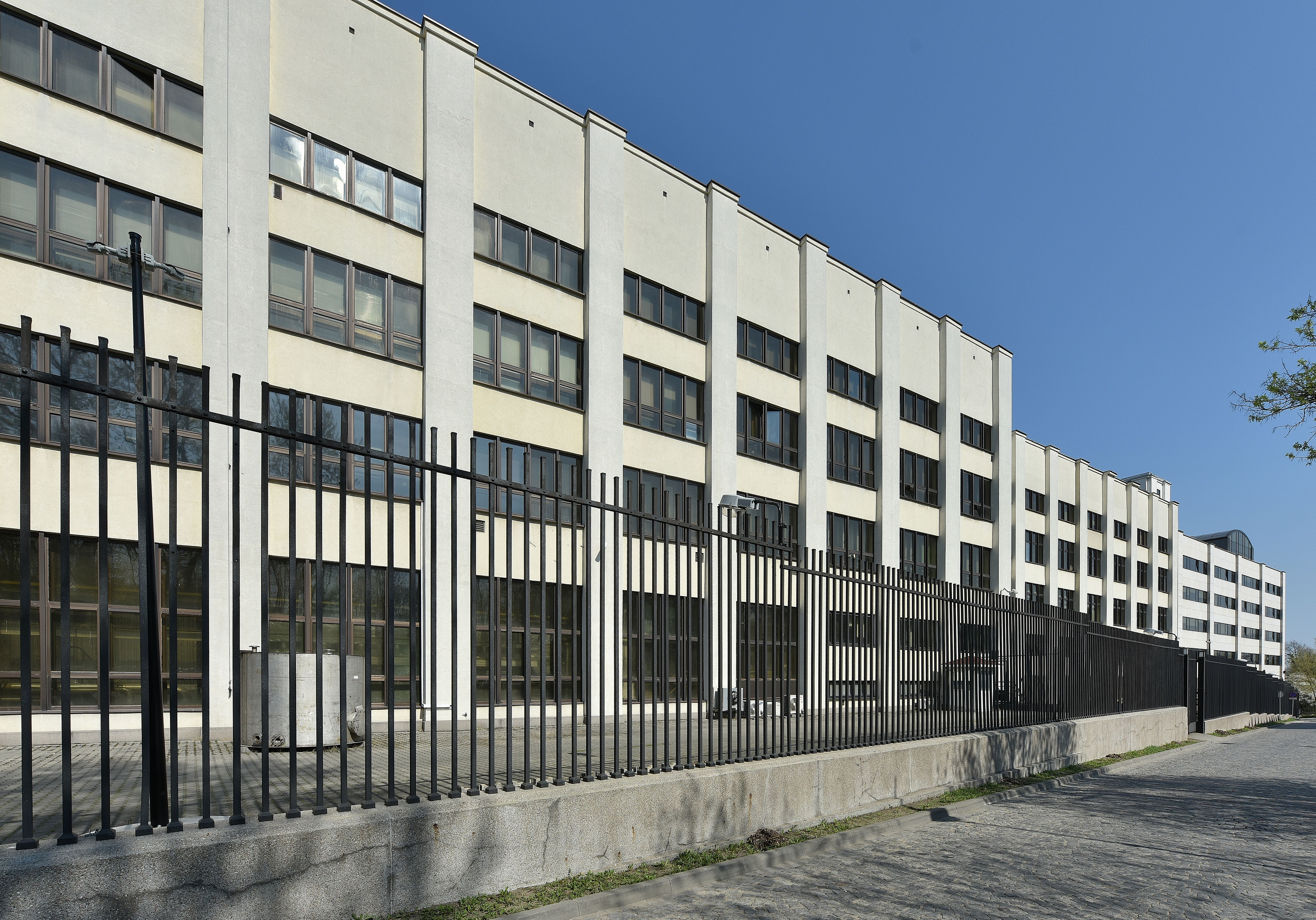 Kompleks budynków Polskiej Wytwórni Papierów Wartościowych od strony ul. Wójtowskiej